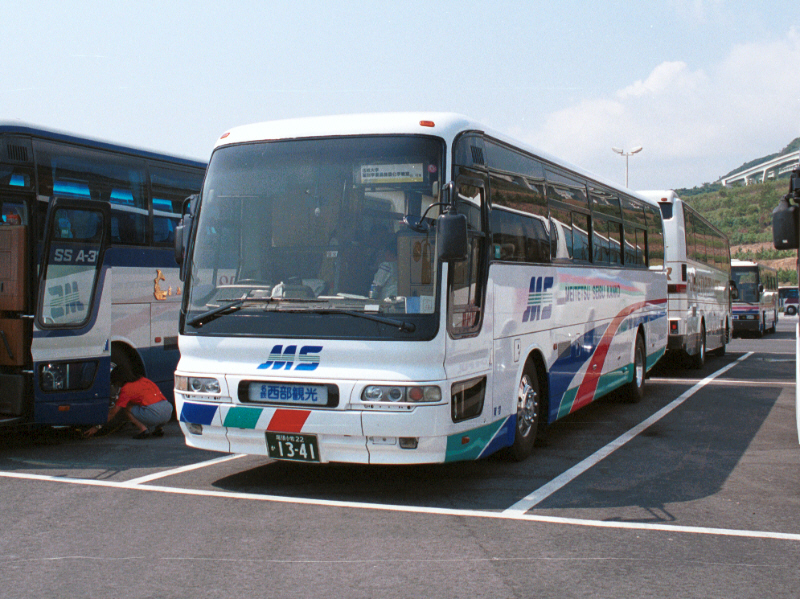 淡路花博駐車場にて 2002-4-14撮影